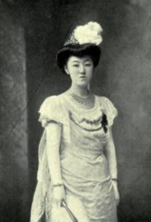 邦彦王妃俔子